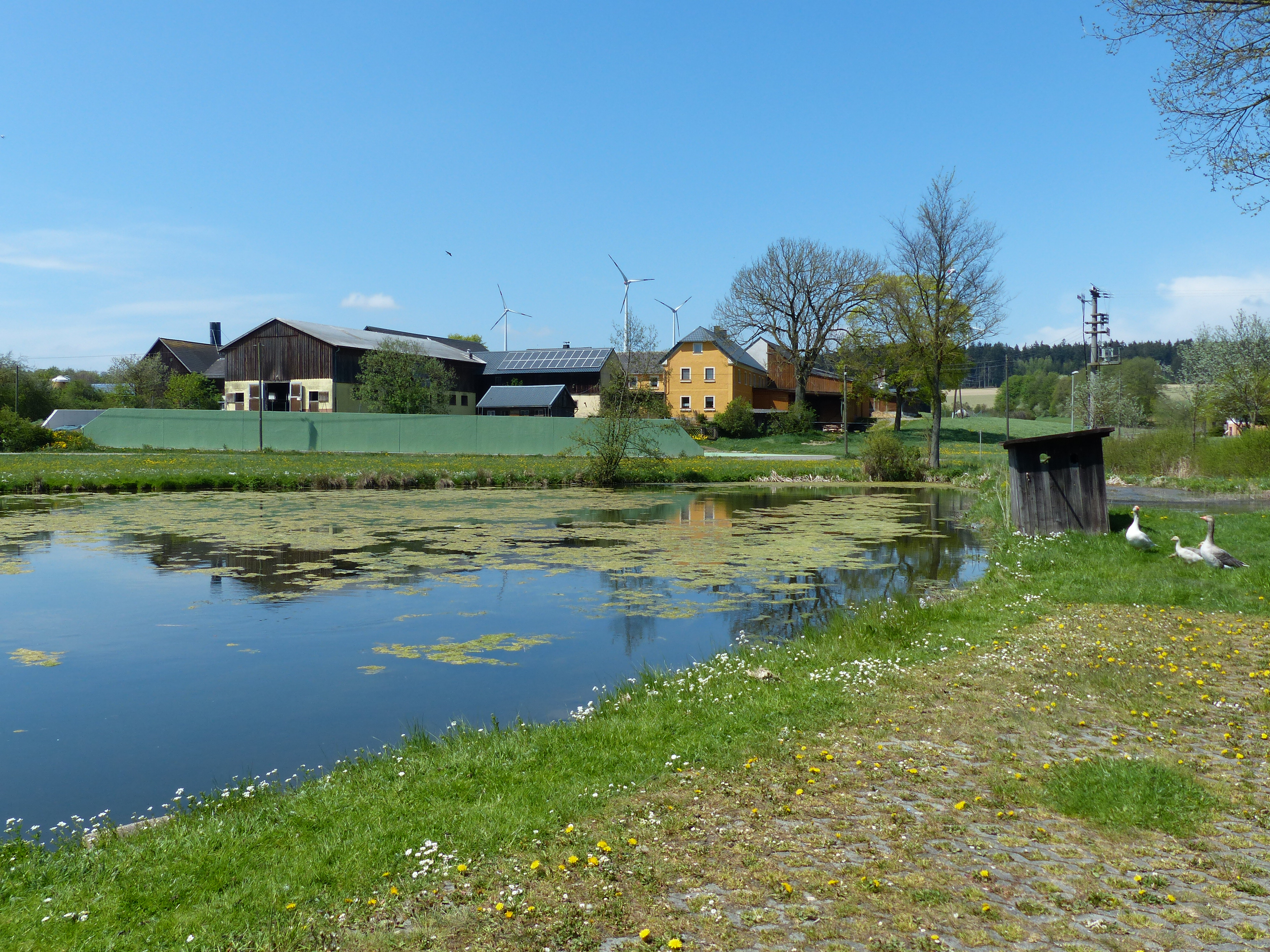 Bilderserie Baudenkmäler in den Ortsteilen der Gemeinde Regnitzlosau